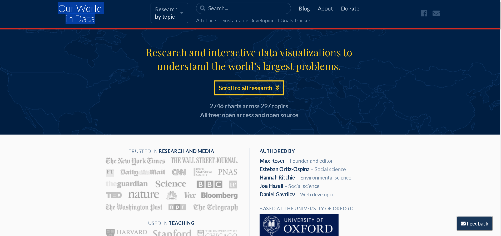 中文（中国大陆）: Ourworldindata.org网页截图